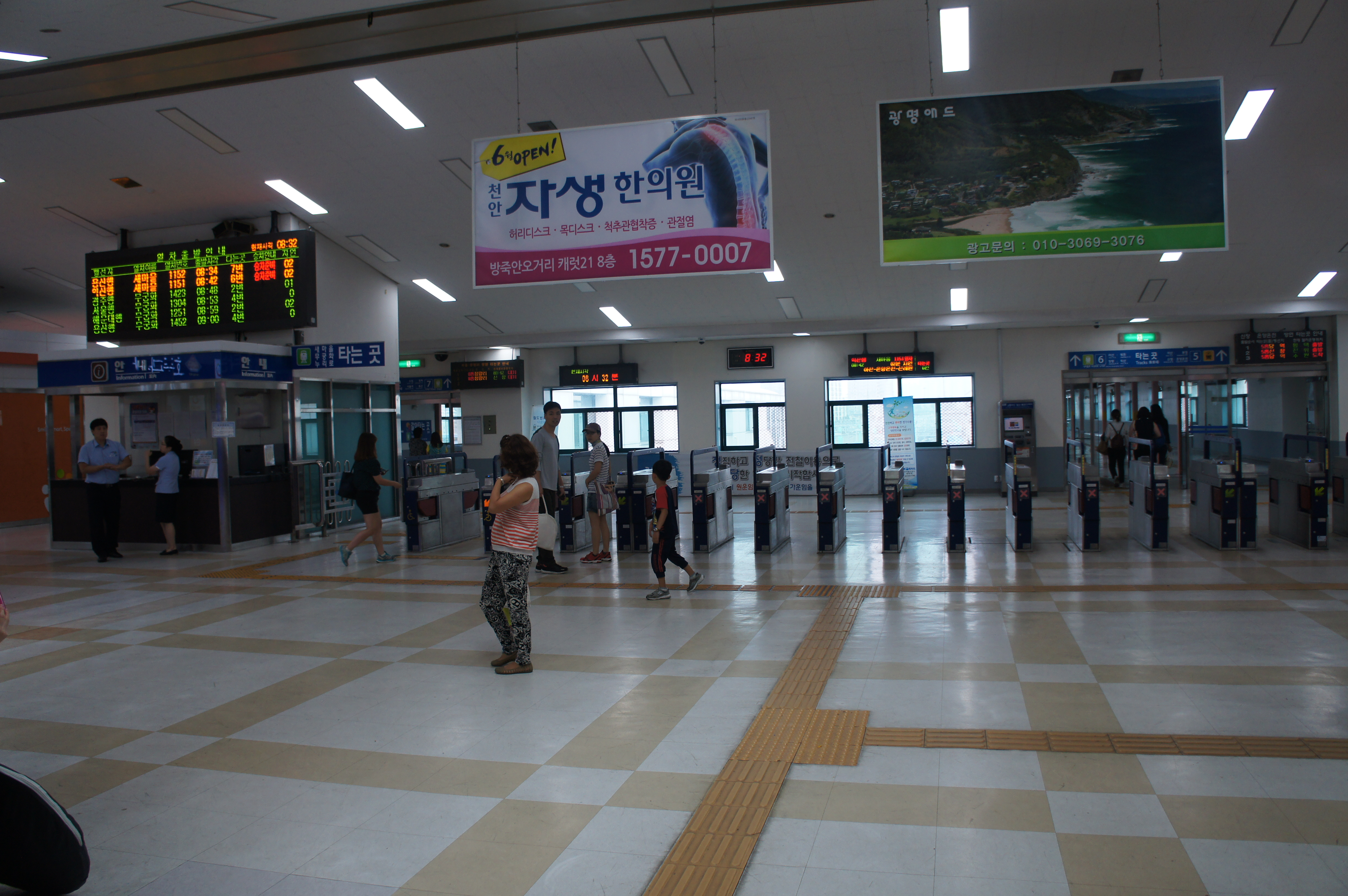 천안역 장항선 대합실